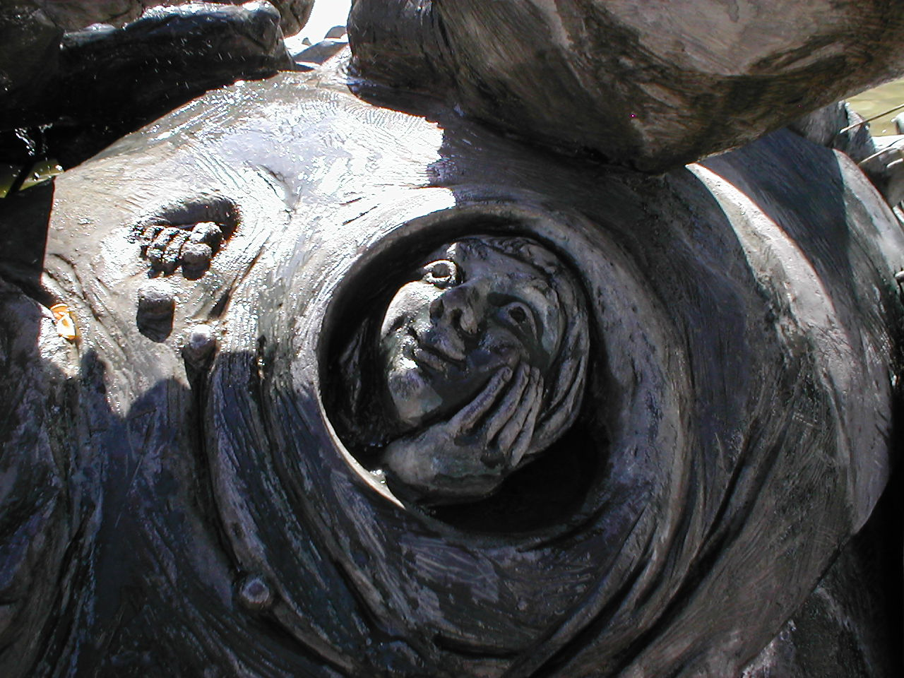 Selbstbildnis der Künstlerin Gudrun Schreiner, Detail am Theaterbrunnen (1982) in Heilbronn